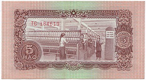 Vietnam 5 Hao 1958 Reverse